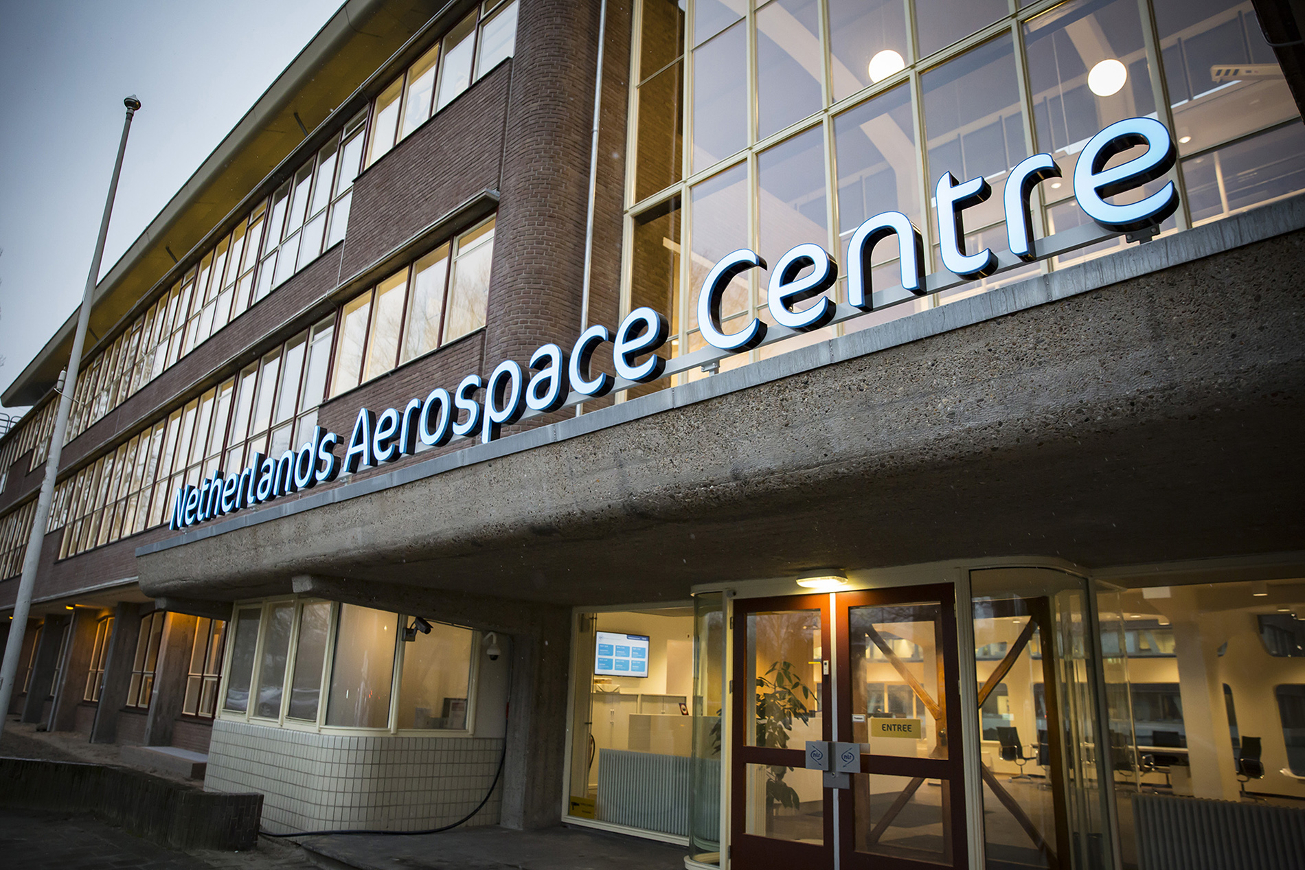 Luchtvaartlaboratorium, A. Fokkerweg 2, Amsterdam.